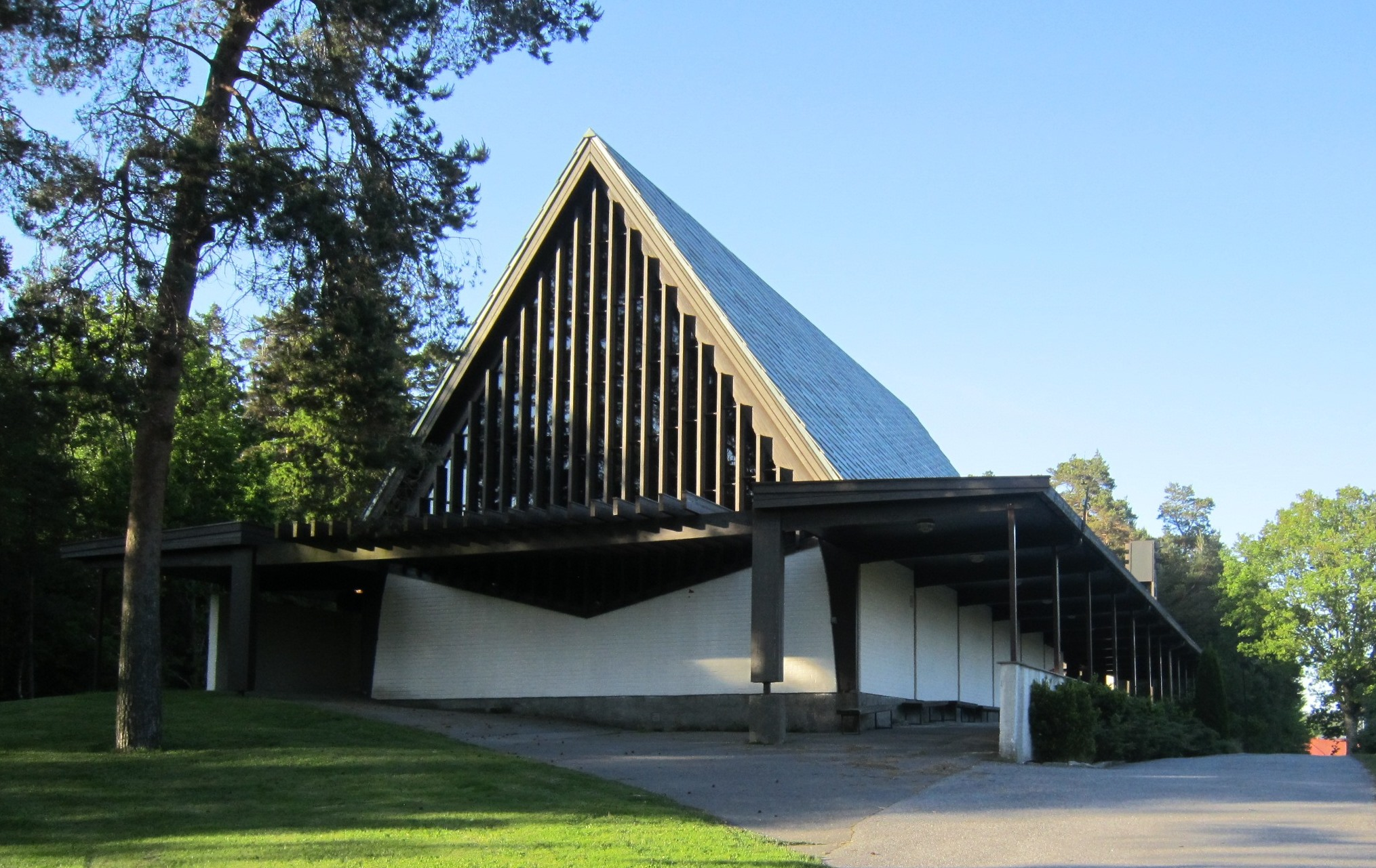 Borge grakapell